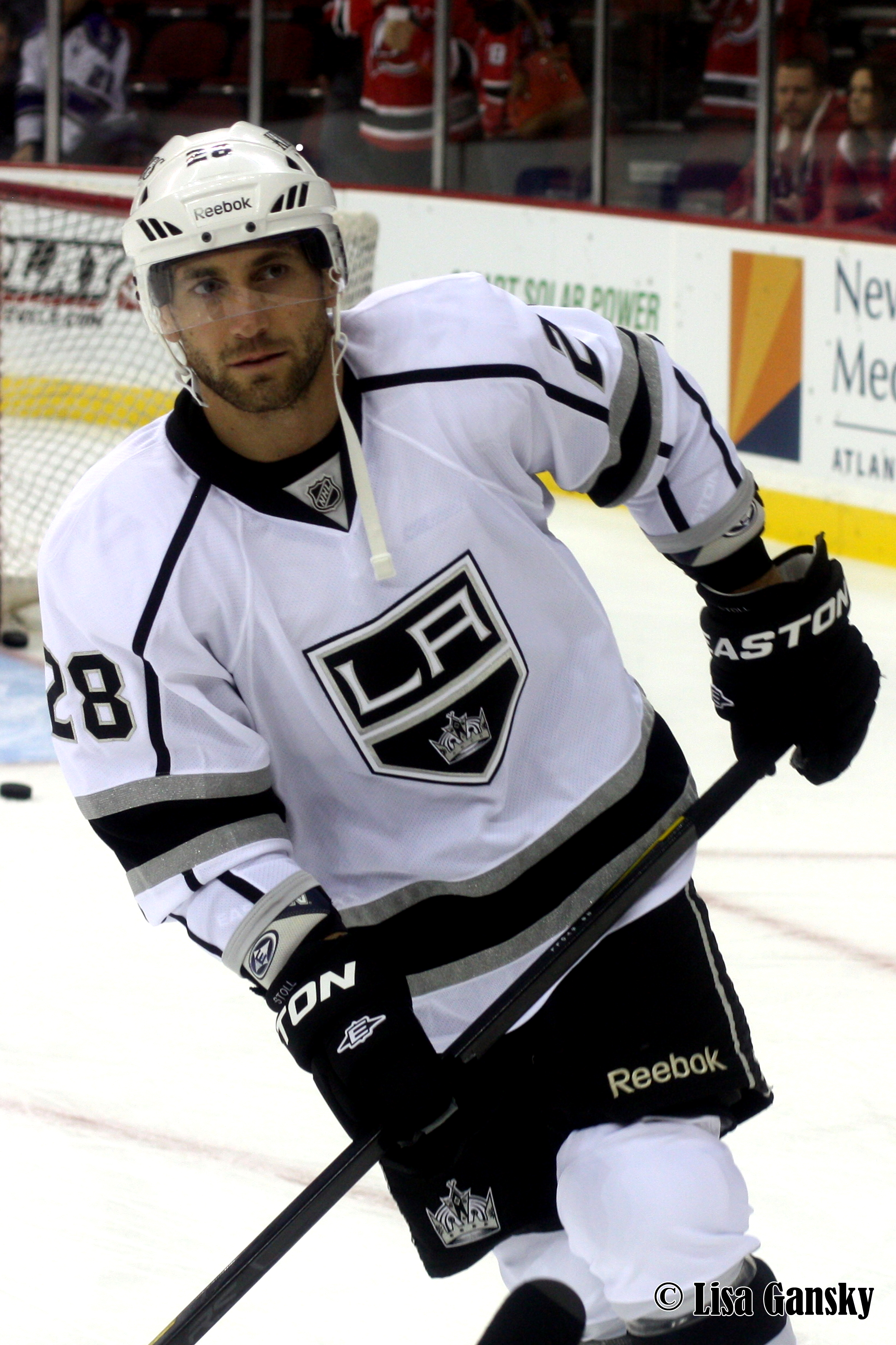 Stoll in 2011.